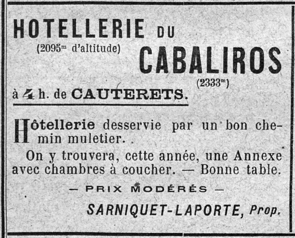 Publicité parue dans le "Bulletin pyrénéen : publié avec le concours de la Section de Pau du Club alpin français (CAF) et de la Société des excursionnistes du Béarn (SEB)" en juillet 1909.